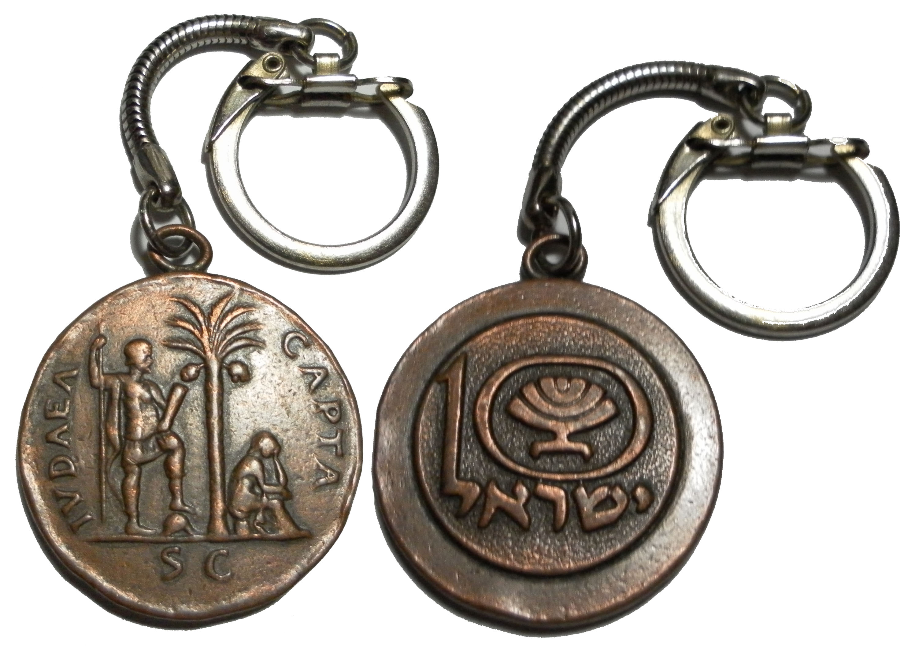 ועדת העשור - מפתחון